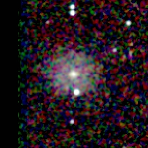 Galaxy NGC 39